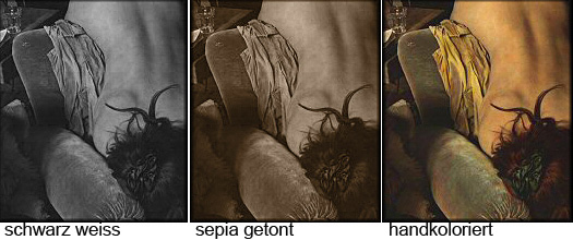 Zyklus, Bildauschnitt aus einem handkolorierten sw. Foto